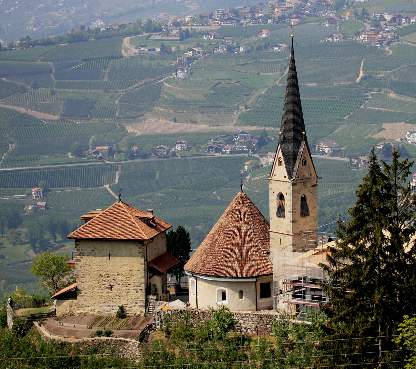 St. Georg in Schenna (Südtirol), links daneben der Uolenturm